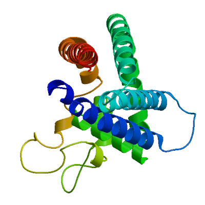 Imatge tridimensional d'una molècula Tspan-15. Està formada per 4 dominis hidrofòbics transmembrana i 2 extracel·lulars.